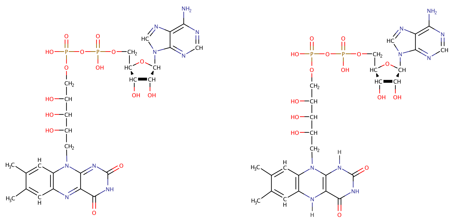 FAD FADH2